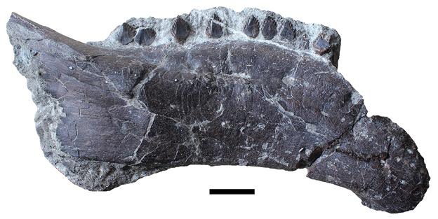 Hungarosaurus tormai (Ankylosauria, Nodosauridae), right dentary (MTM 2007.25.2) in lateral view